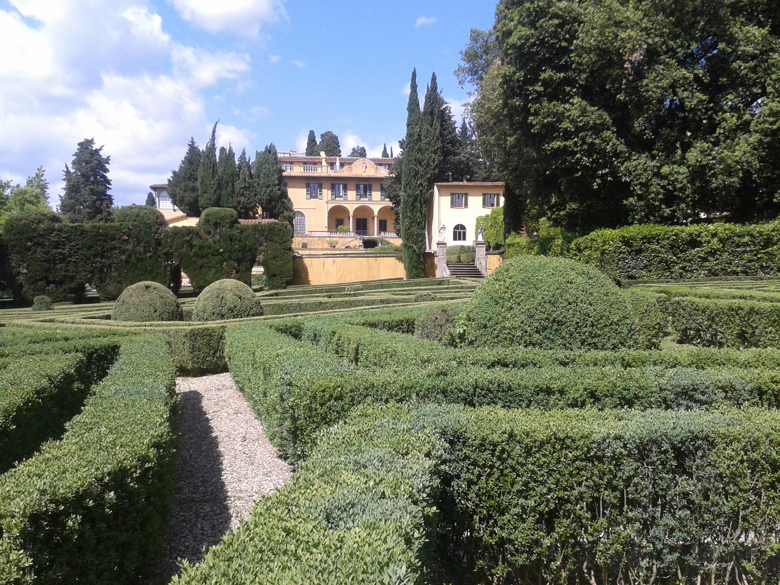 Europäisches Hochschulinstitut Florenz, vom Garten aus fotografiert.